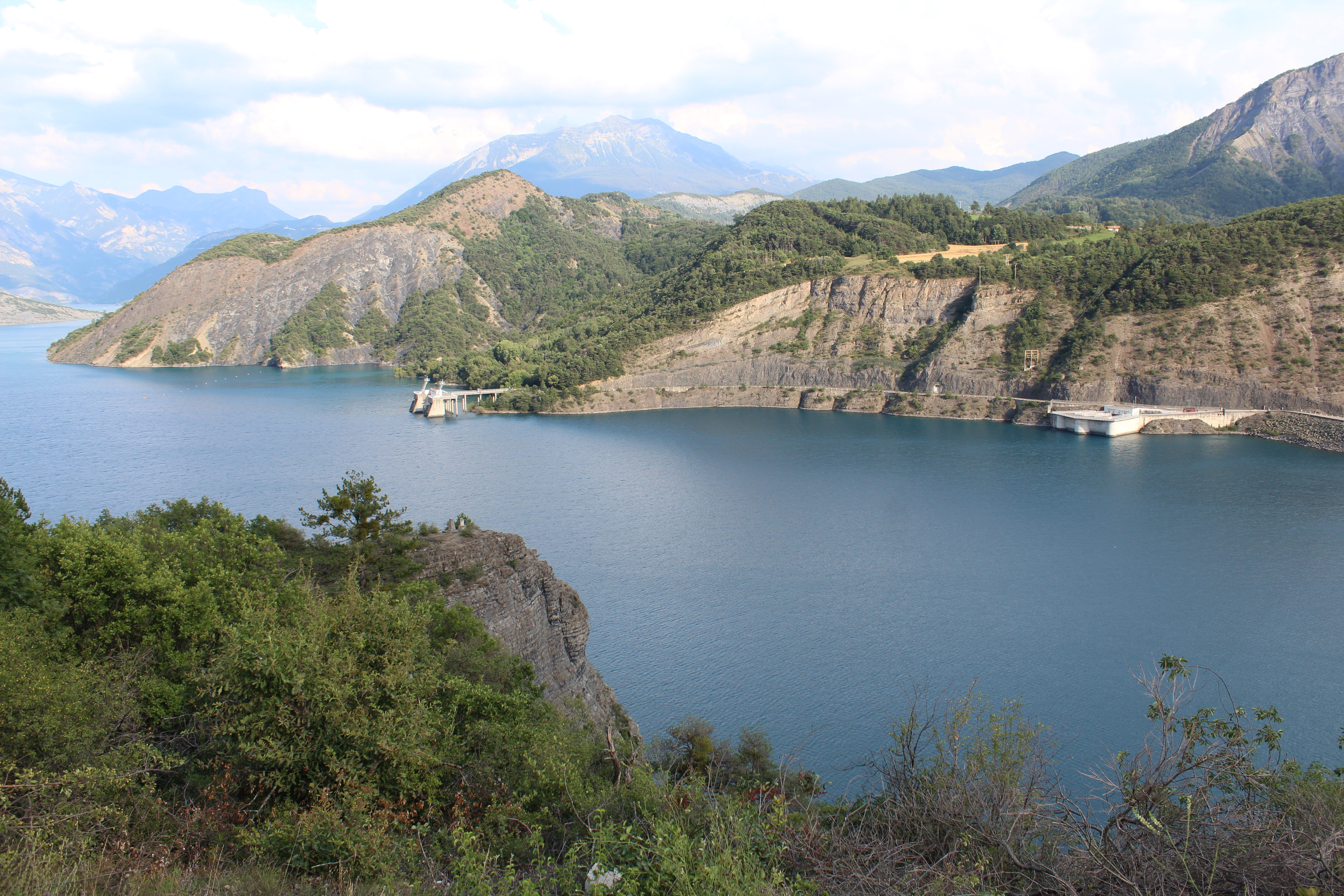 Barrage de Serre-Ponçon vue depuis Rousset.